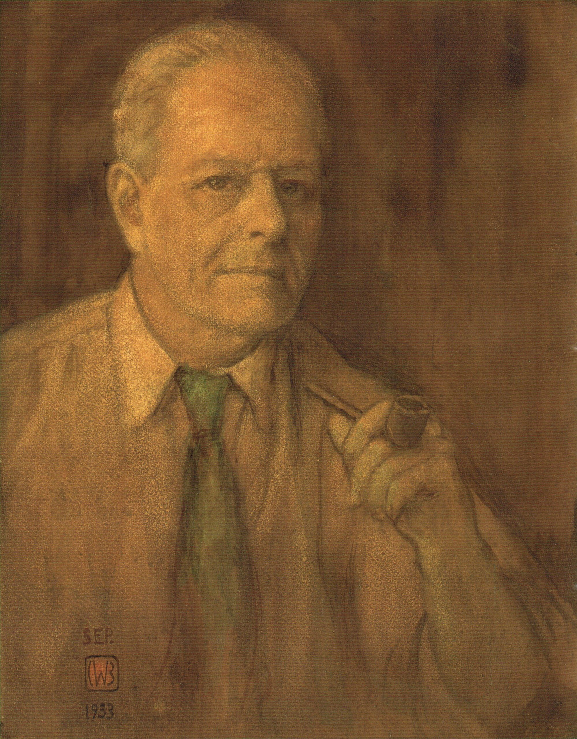 Self-portrait